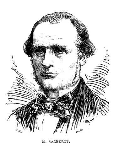 Portrait extrait page 608 du livre "Histoire de la révolution de 1870-1871" de Jules Claretie (1840-1913) Éditeur : bureaux de "L'Éclipse" (Paris) Date d'édition : 1872-1875